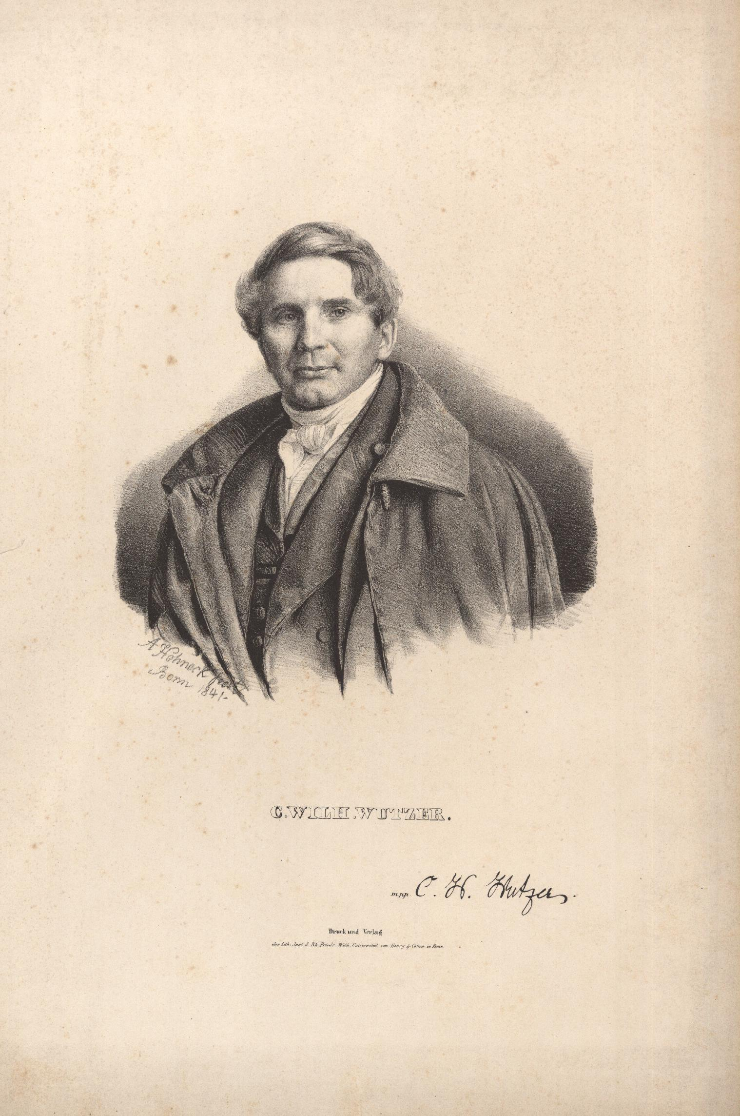 Lithographie von Carl Wilhelm Wutzer